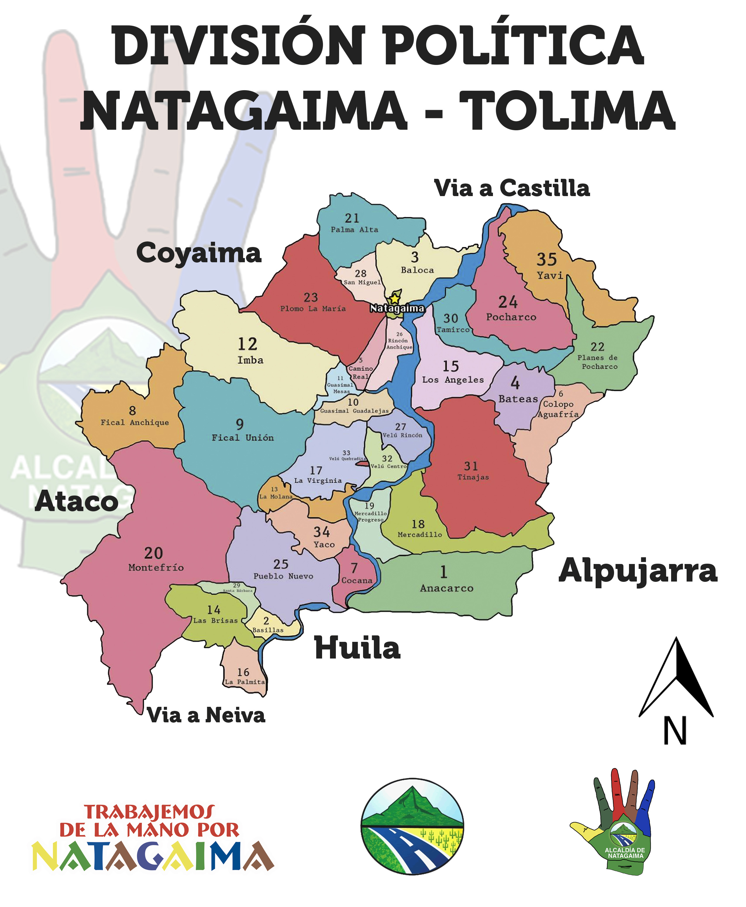 Mapa de las veredas de Natagaima y sus limites